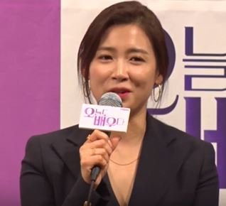 14일 오후 서울 강남구 임피리얼팰리스 호텔에서 열린 MBN 예능프로그램 '오늘도 배우다 제작발표회에 참석한 남상미